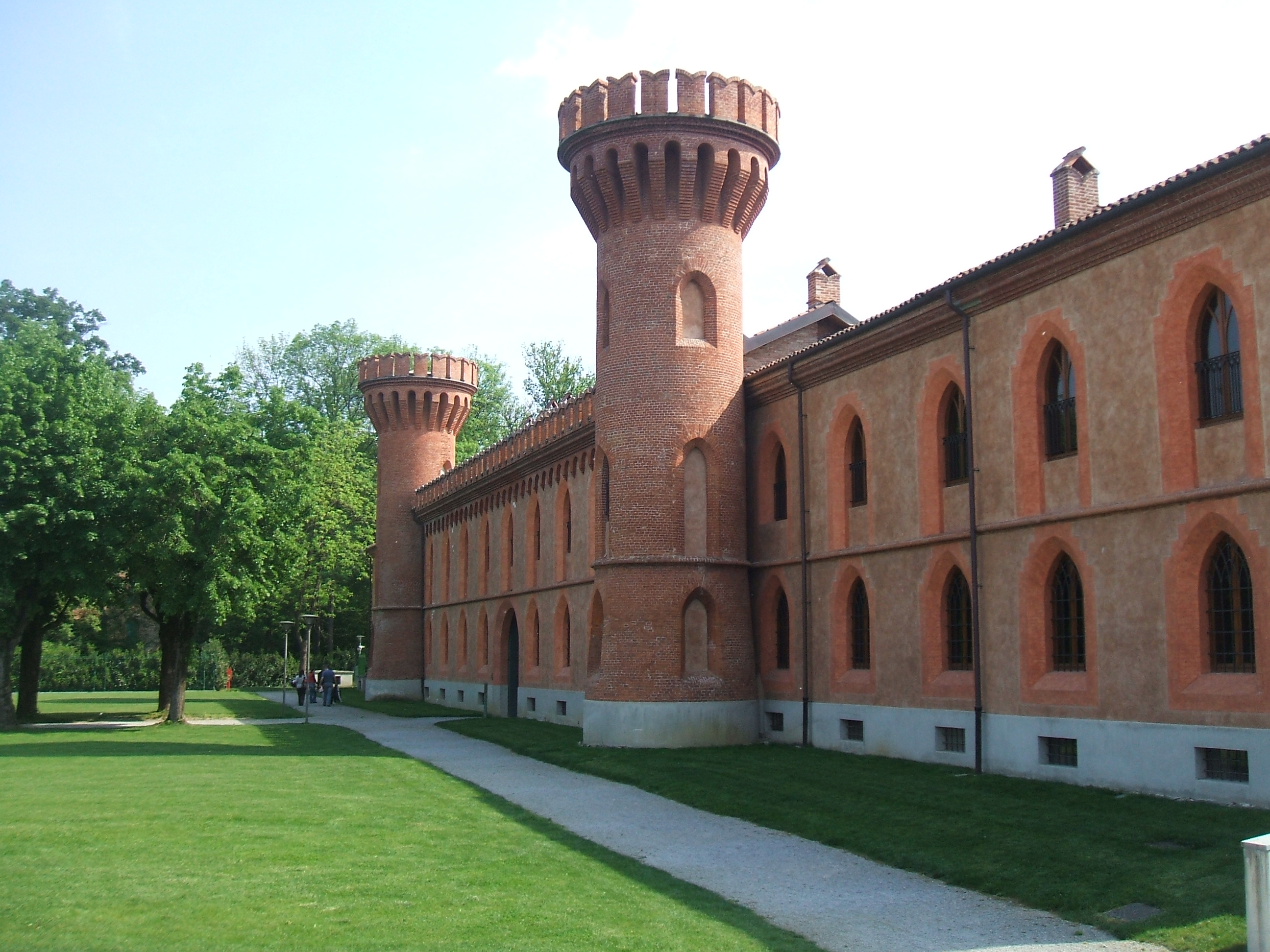 Università di Scienze Gastronomiche (the castle)